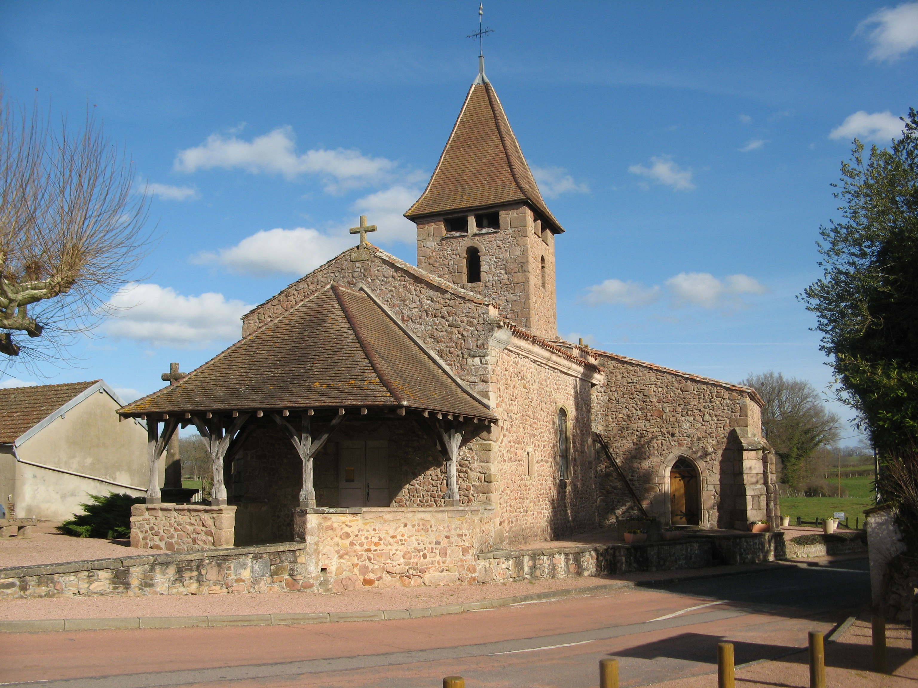 Sail-les-Bains, église